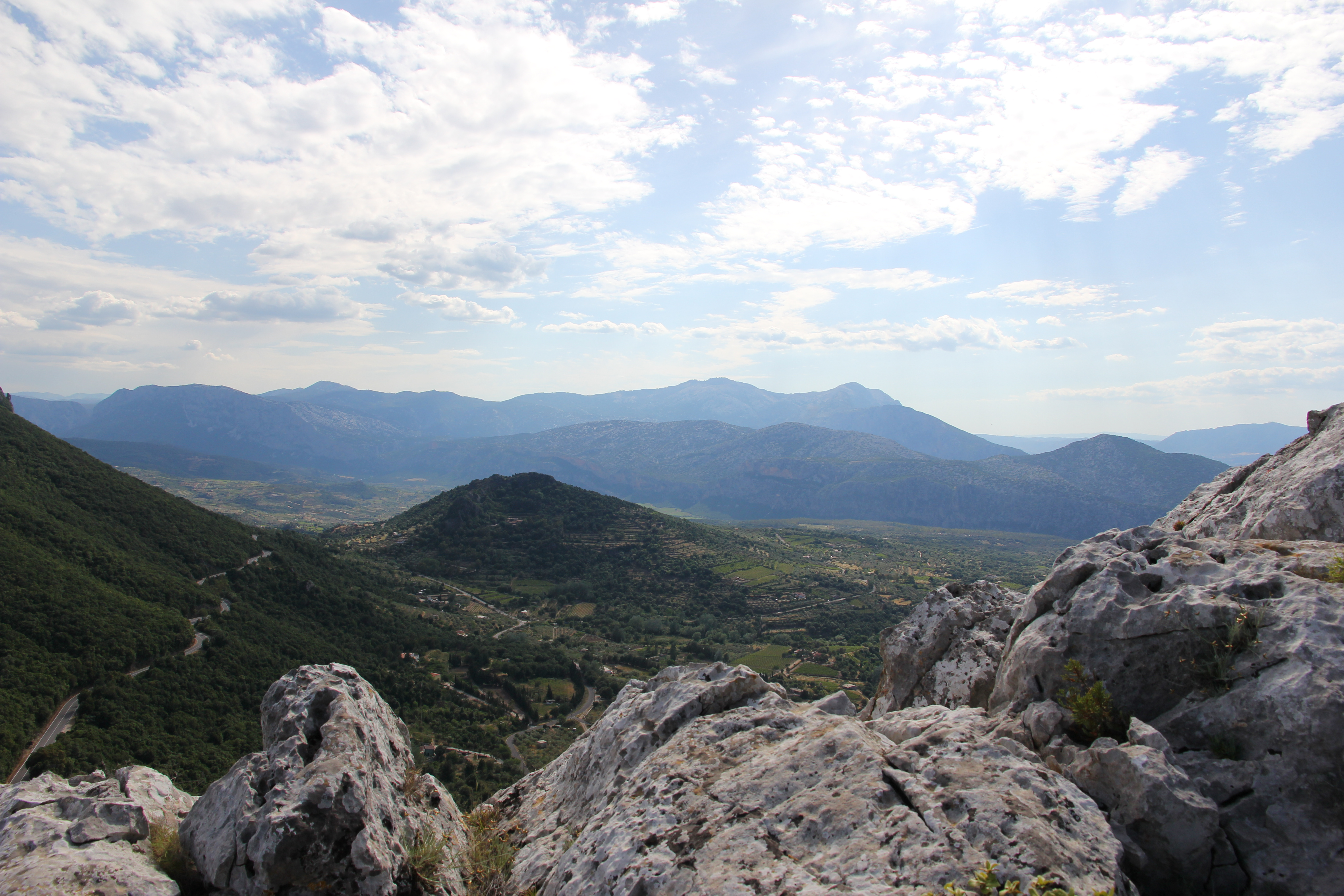 Oliena - Supramonte